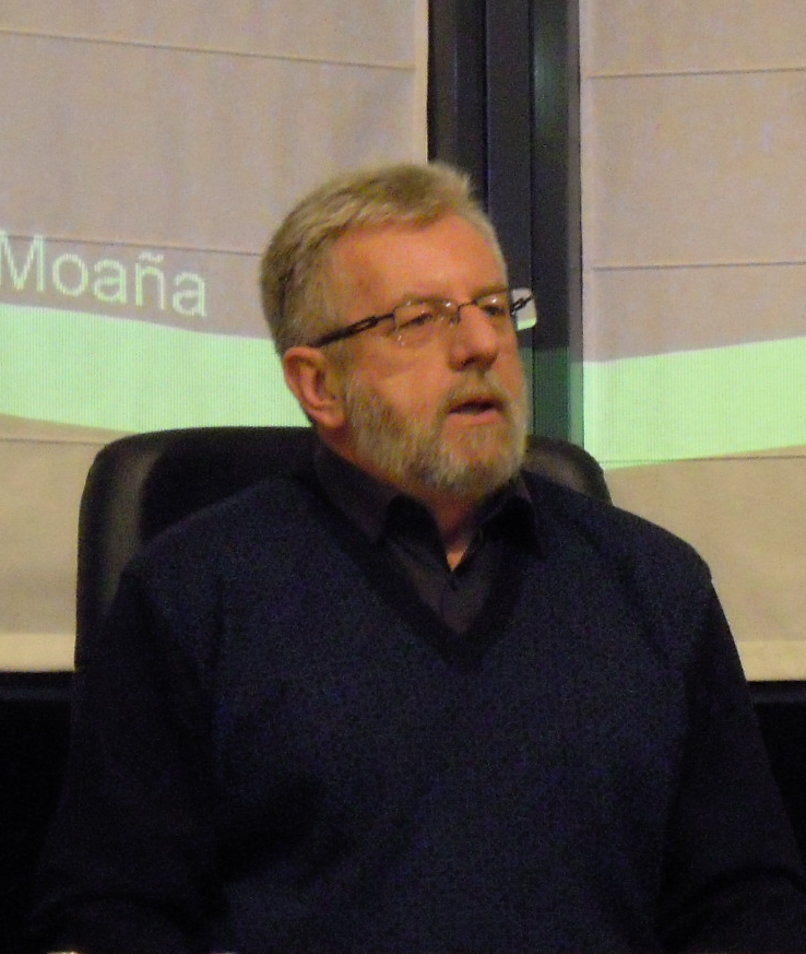 Xosé María Álvarez Cáccamo, na casa do concello de Moaña